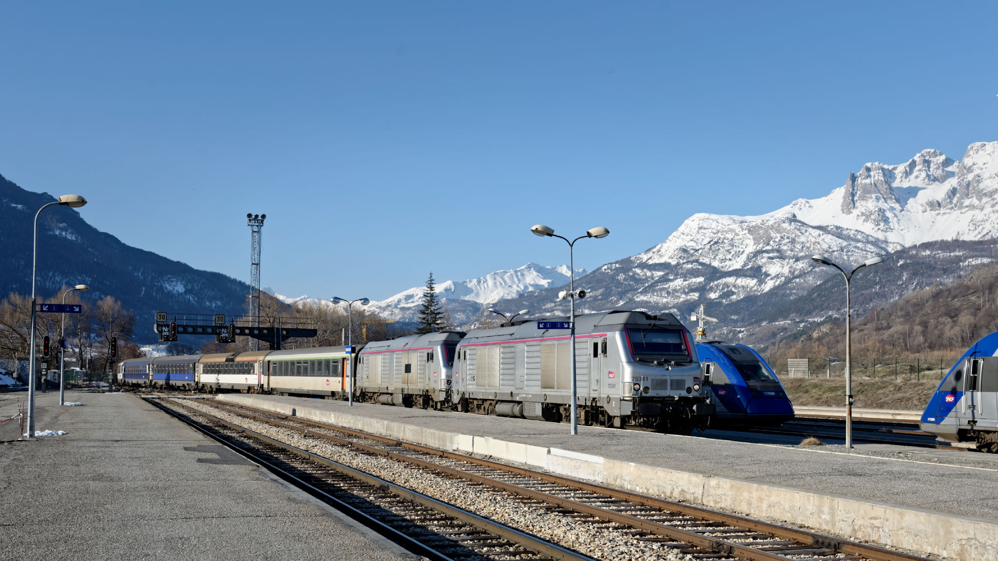 L'Intercités de nuit Paris - Austerlitz Briançon tracté par 2 BB 75300 arrive à son terminus le 15 mars 2016.